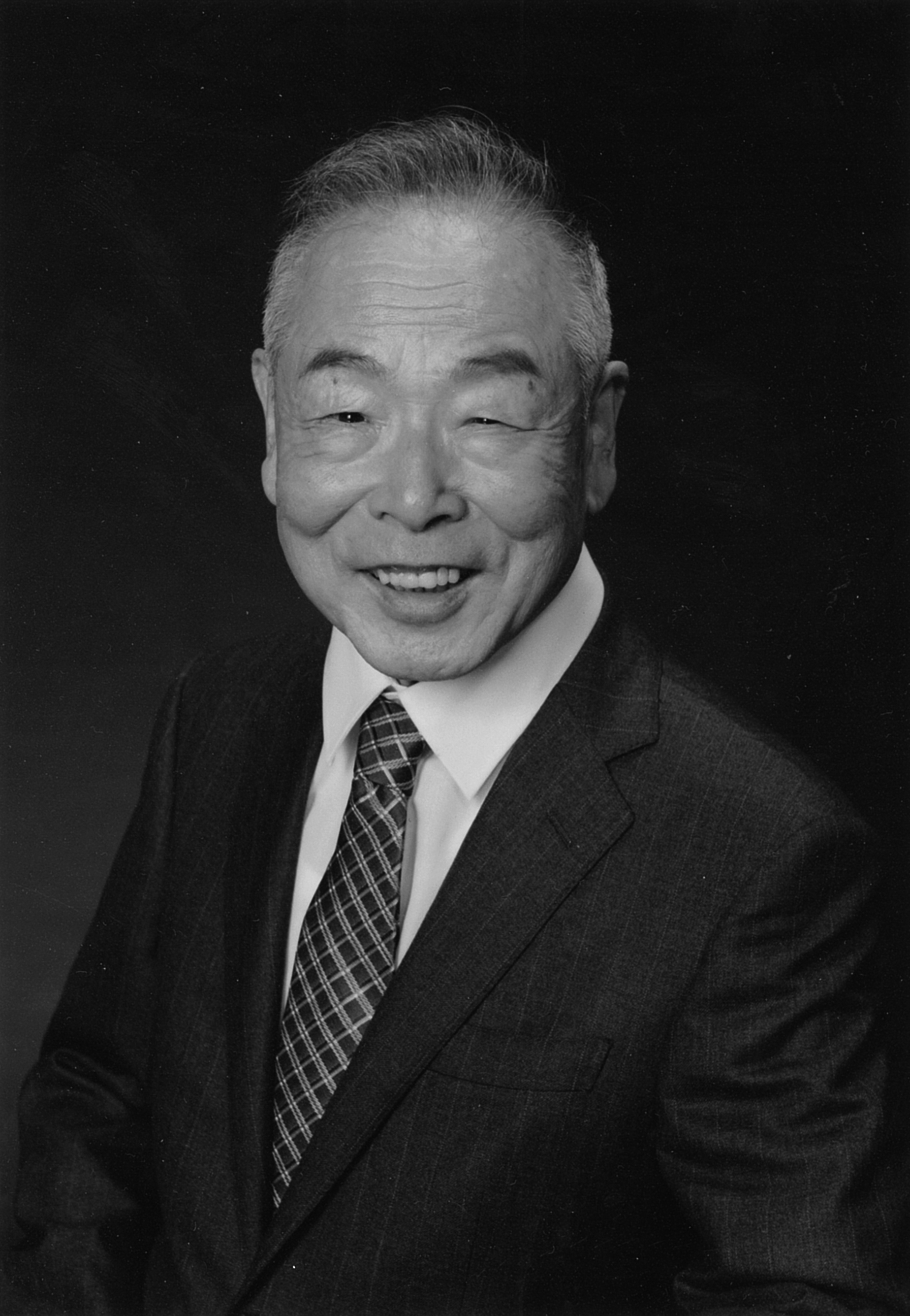 板倉聖宣、20212年春撮影。82歳。